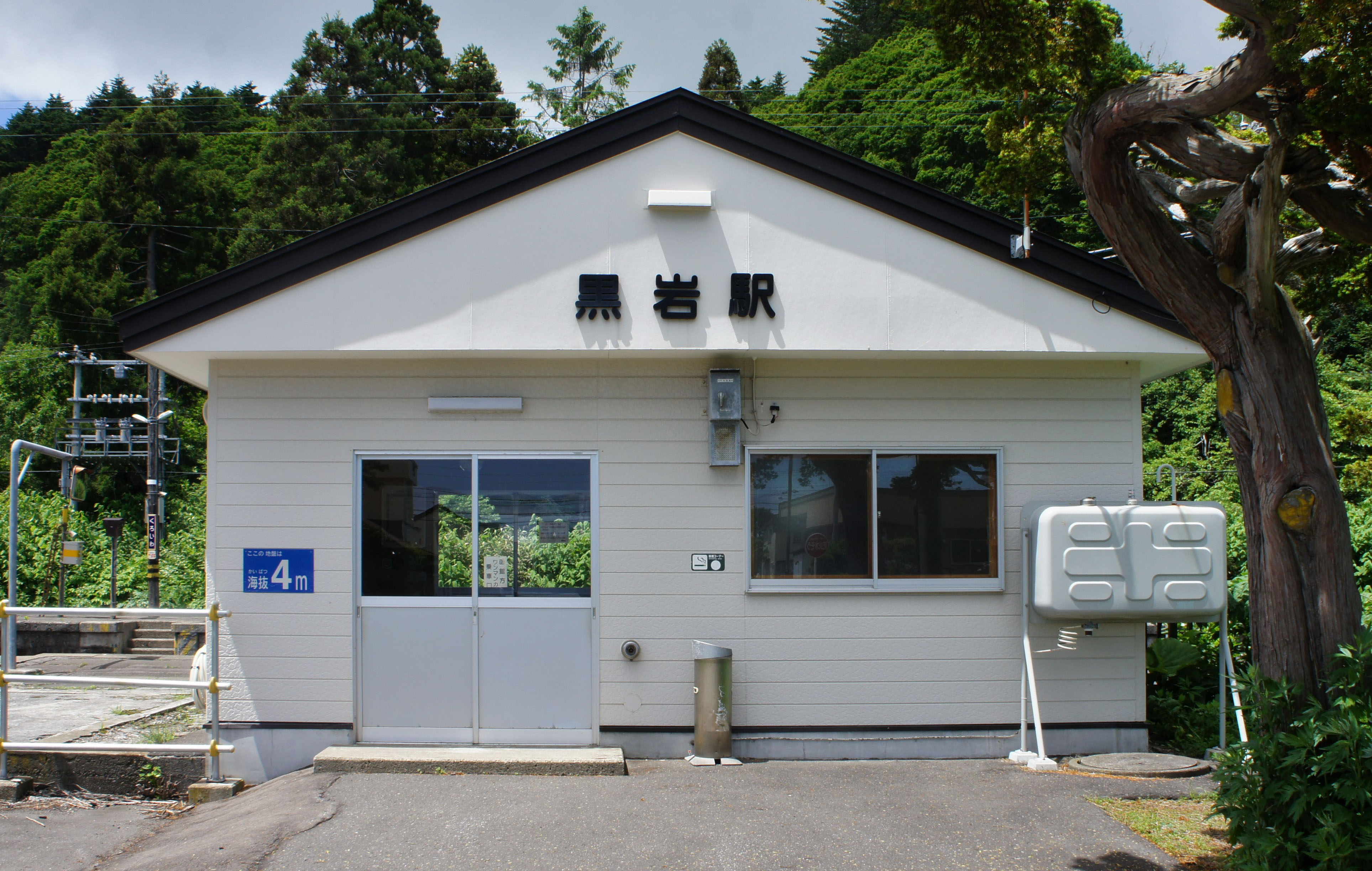 JR函館本線・黒岩駅の駅舎